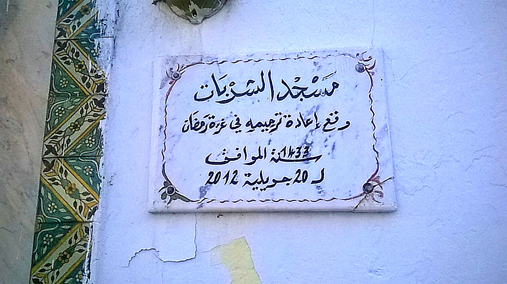 Sidi El Béchir , Tunis سيدي البشير ، تونس